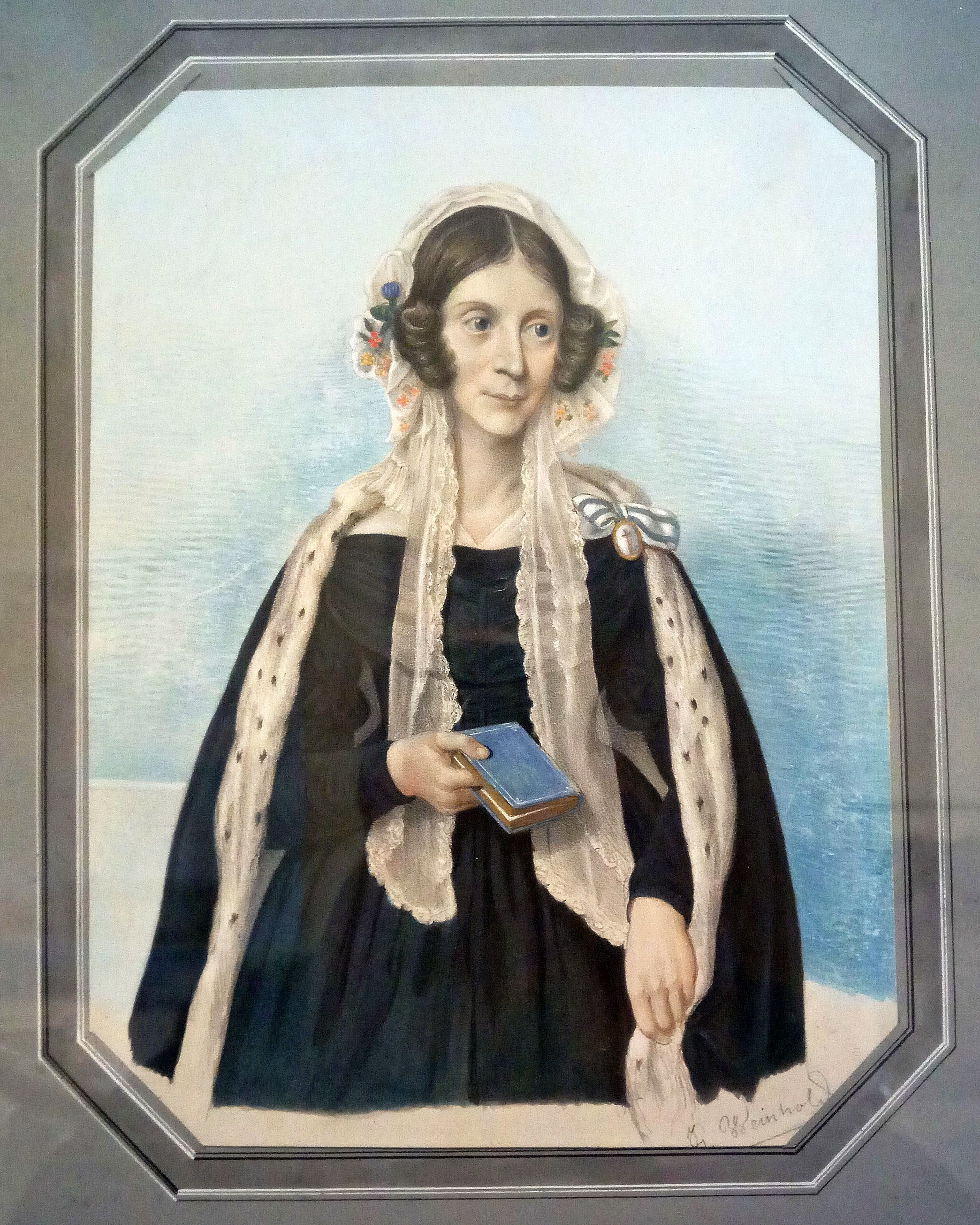 Gräfin Seraphine Franziska Barbara zu Leiningen-Westerburg-Neuleiningen (1810-1874), Standesherrin zu Westerburg, in Tracht und mit Abzeichen des Adligen Damenstiftes Innsbruck